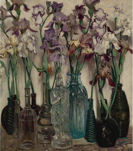 Натюрморт з ірисами і новим використанням ромових пляшок роботи художника Фредеріка Джада Вога 1922 року